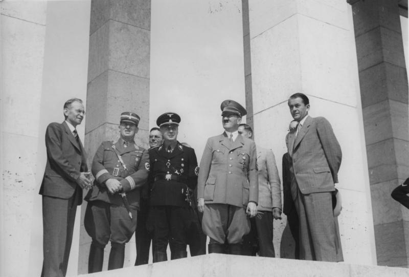 Adolf Hitler in Nürnberg. Der Führer und Reichskanzler besichtigte in diesen Tagen die Partei-Neubauten in Nürnberg. Von links nach rechts: Prof. Bruckmann, Oberbürgermeister von Nürnberg Liebel, Botschafter von Ribbentrop, der Führer und Prof. Speer Scherl-Bilderdienst 27.6.1937 [Herausgabedatum] 8334-37